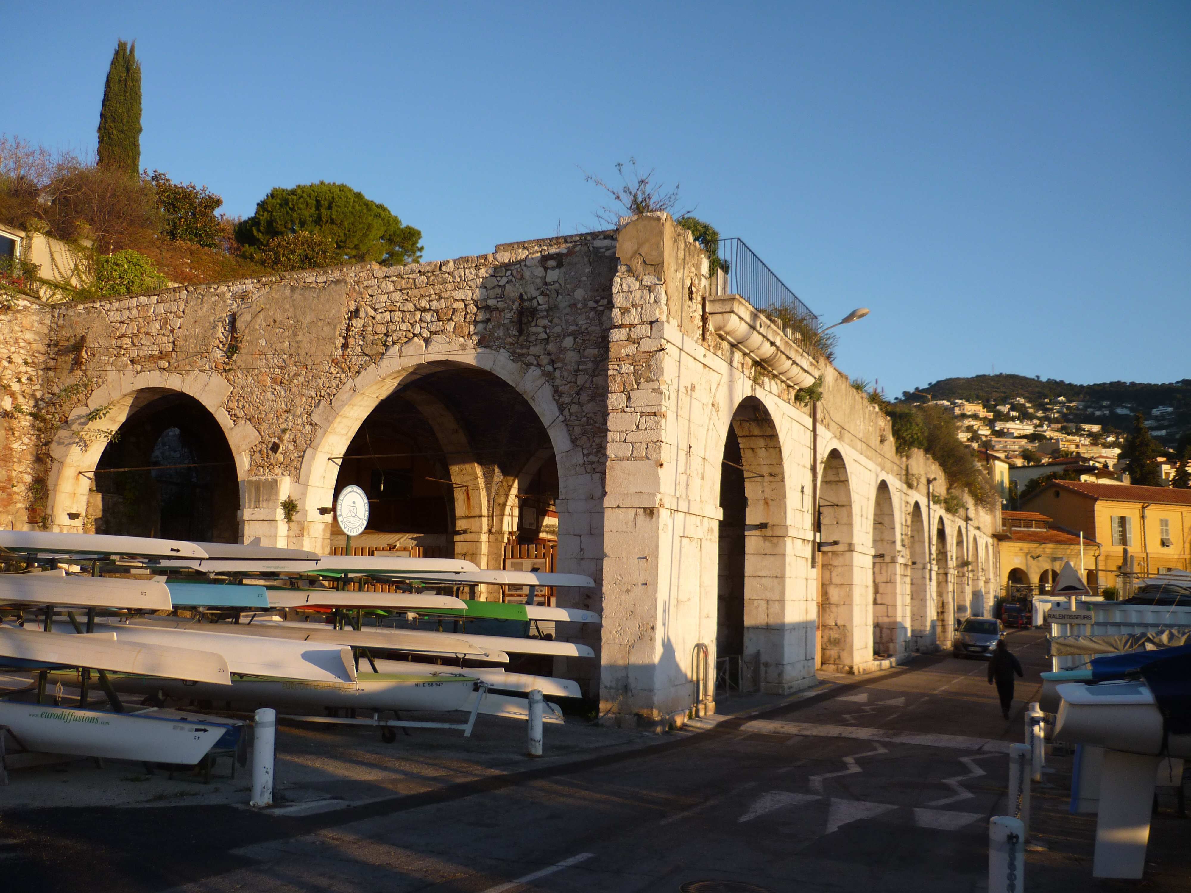 Voûtes de la Darse de Villefranche-sur-Mer